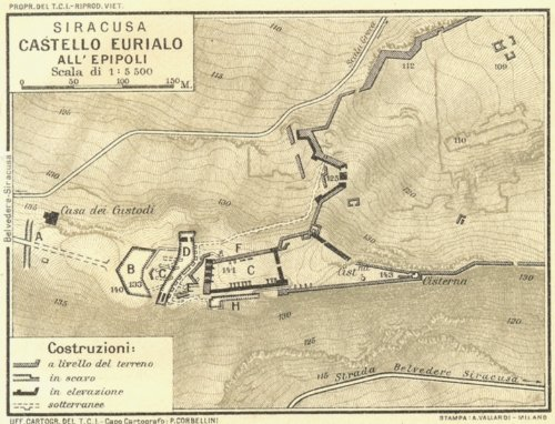 Mappa del Castello Eurialo sull'Epipoli